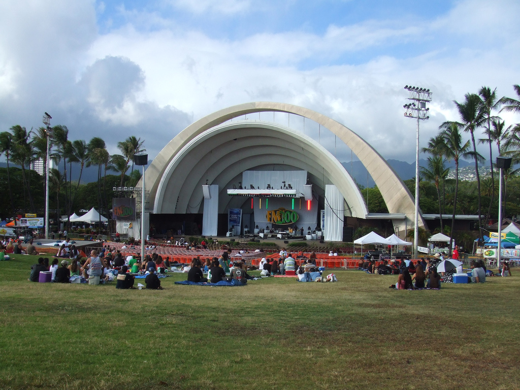 Waikiki Shell, Honolulu, Hawaii